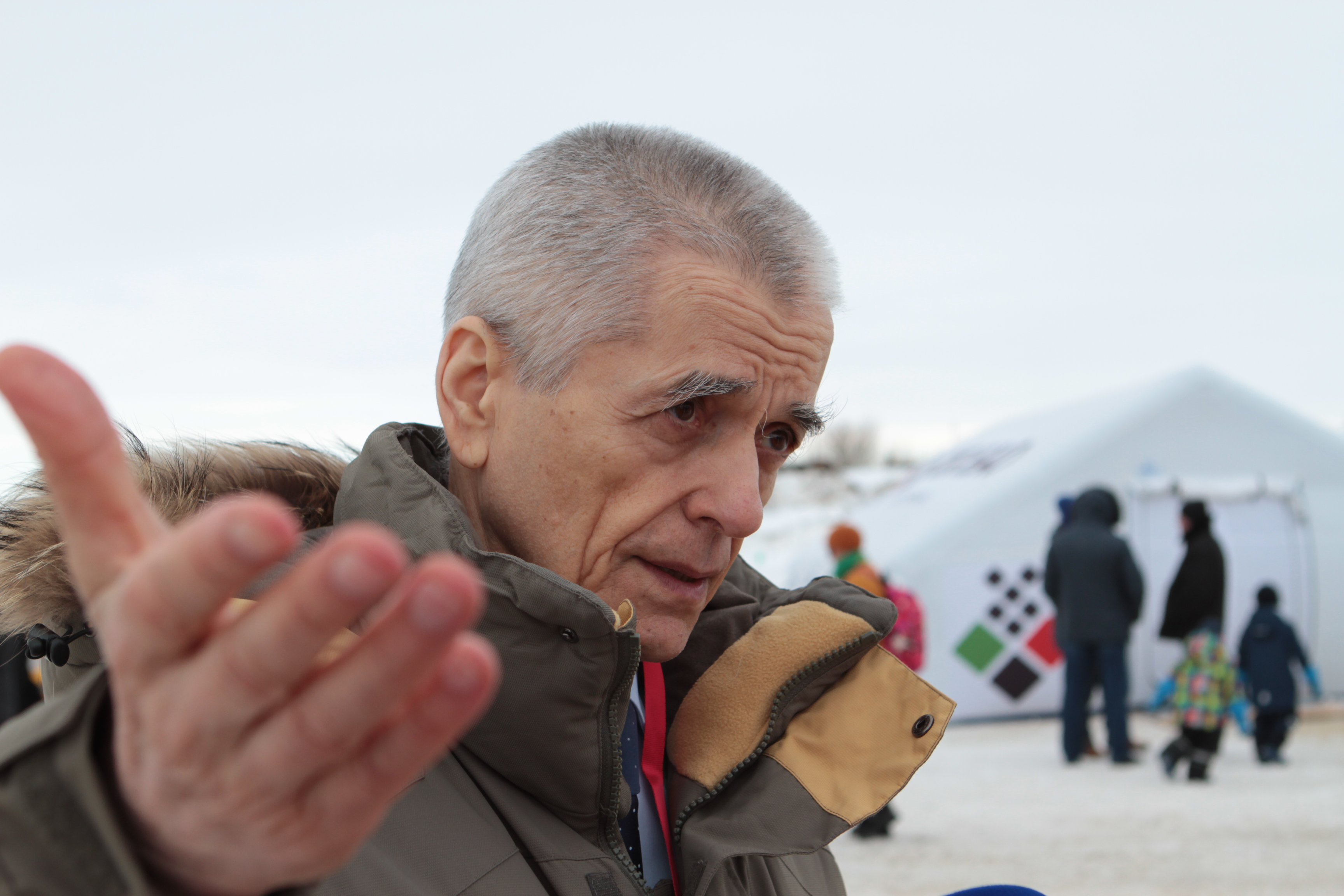 Геннадий Онищенко в Нарьян-Маре на снегоходных гонках на приз Артура Чилингарова